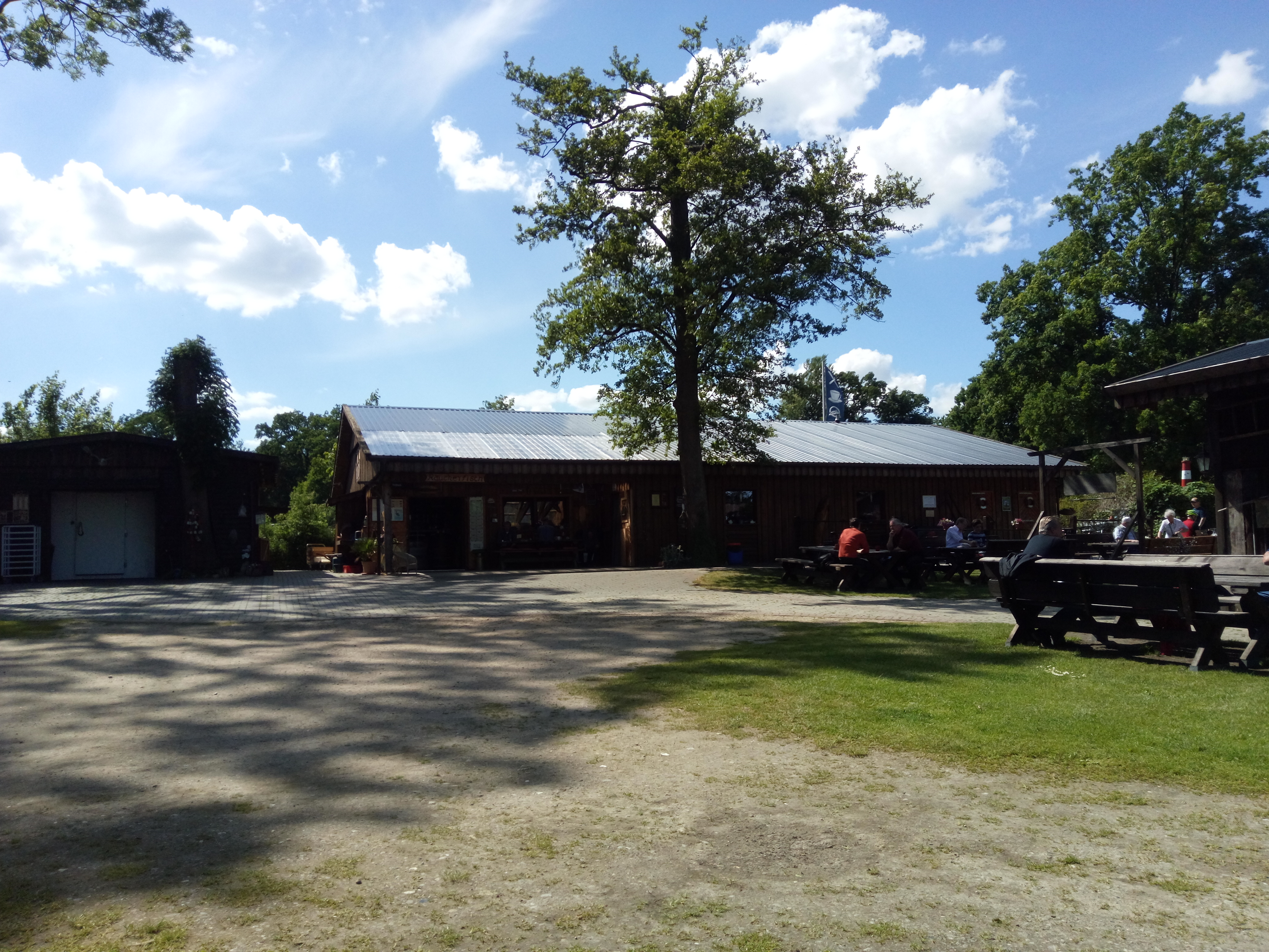 Überblick über den Hof der Fischerei Lasner.